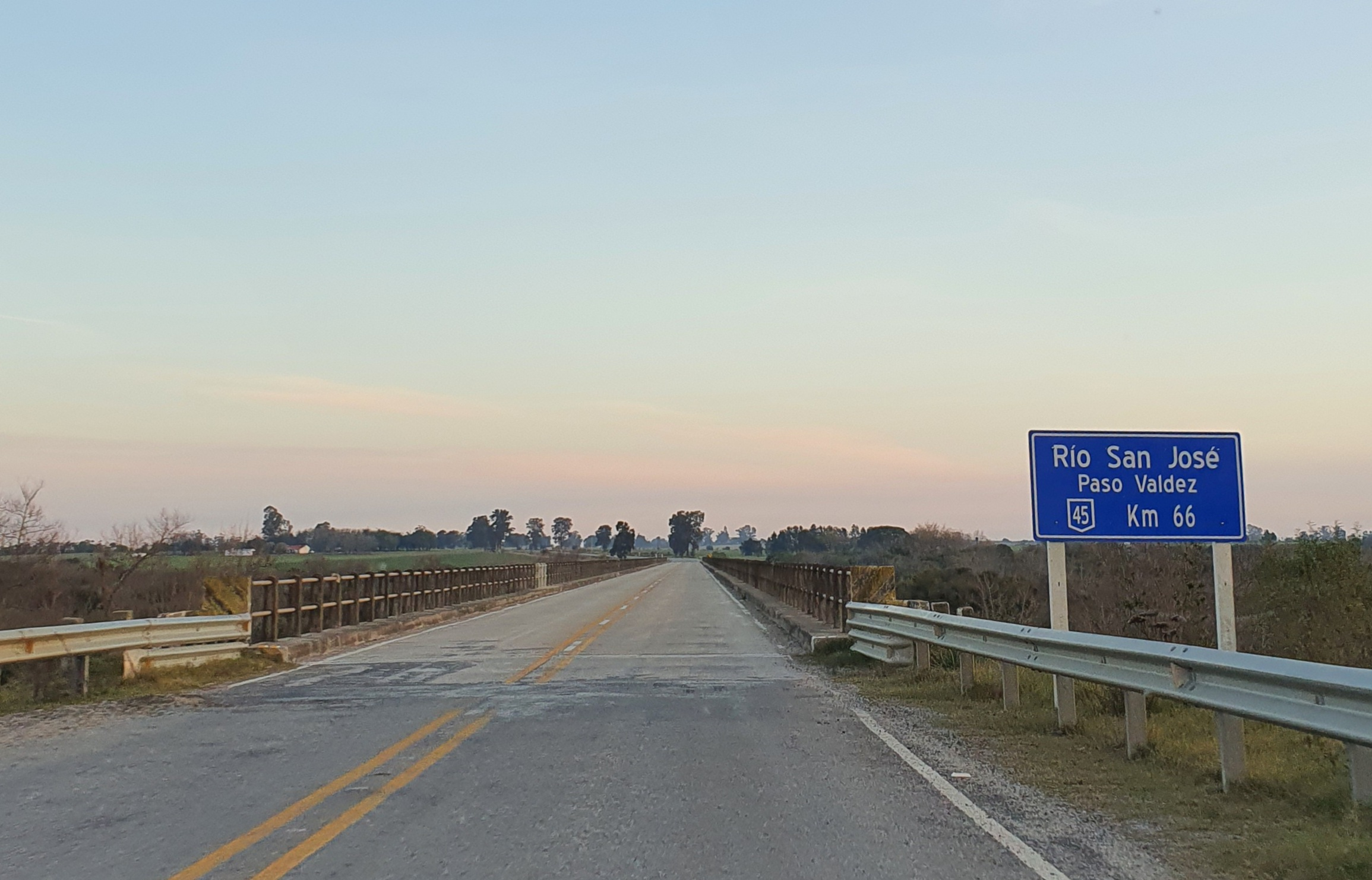 Ruta 45 Paso Valdez, Uruguay